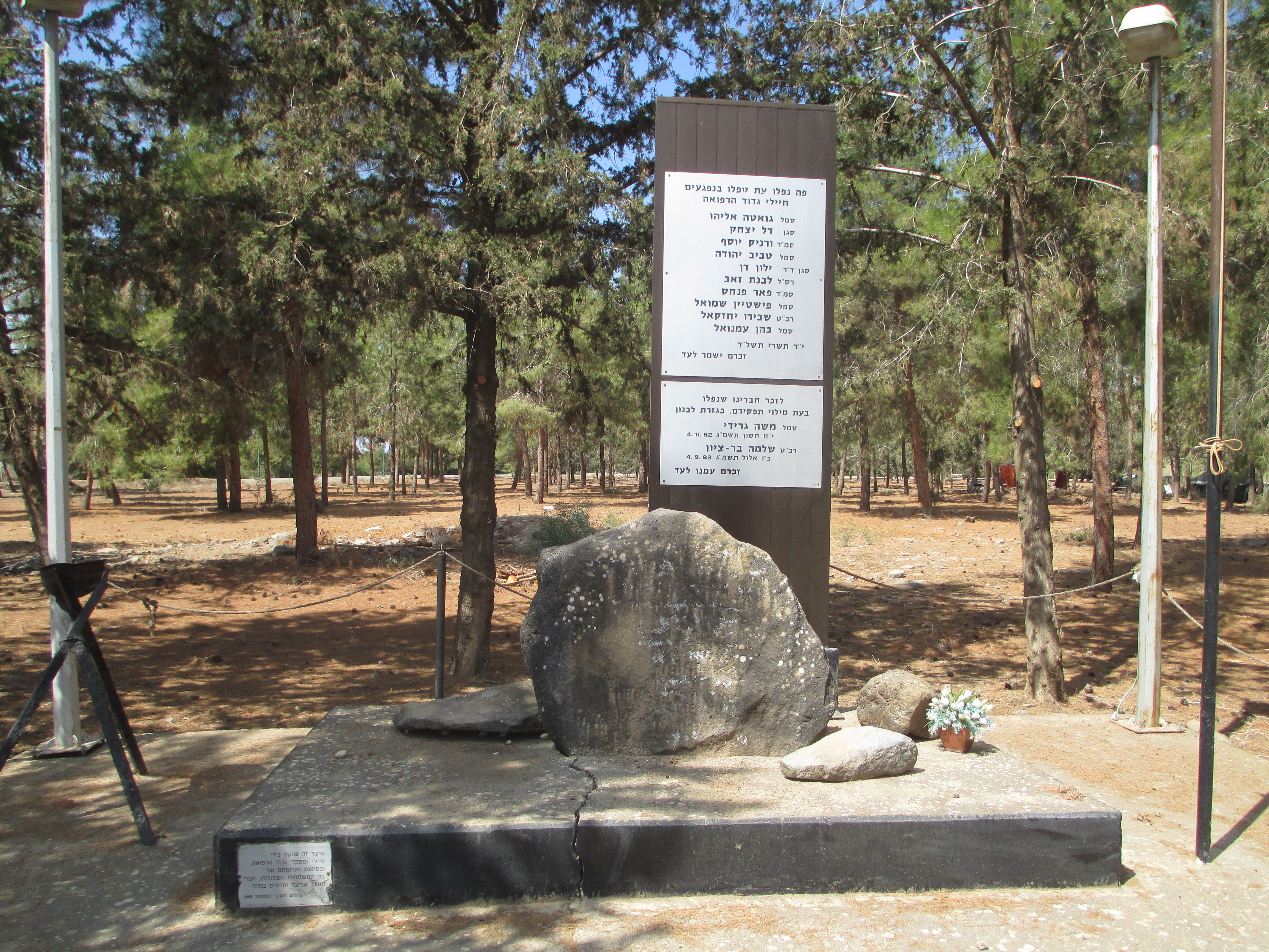 אנדרטת גדוד רפואה 281 ברמת הגולן